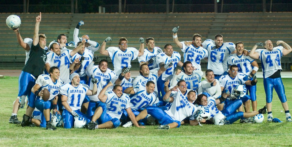 Gli Sharks battono a sorpresa a Firenze i Guelfi e approdano al Silver Bowl.